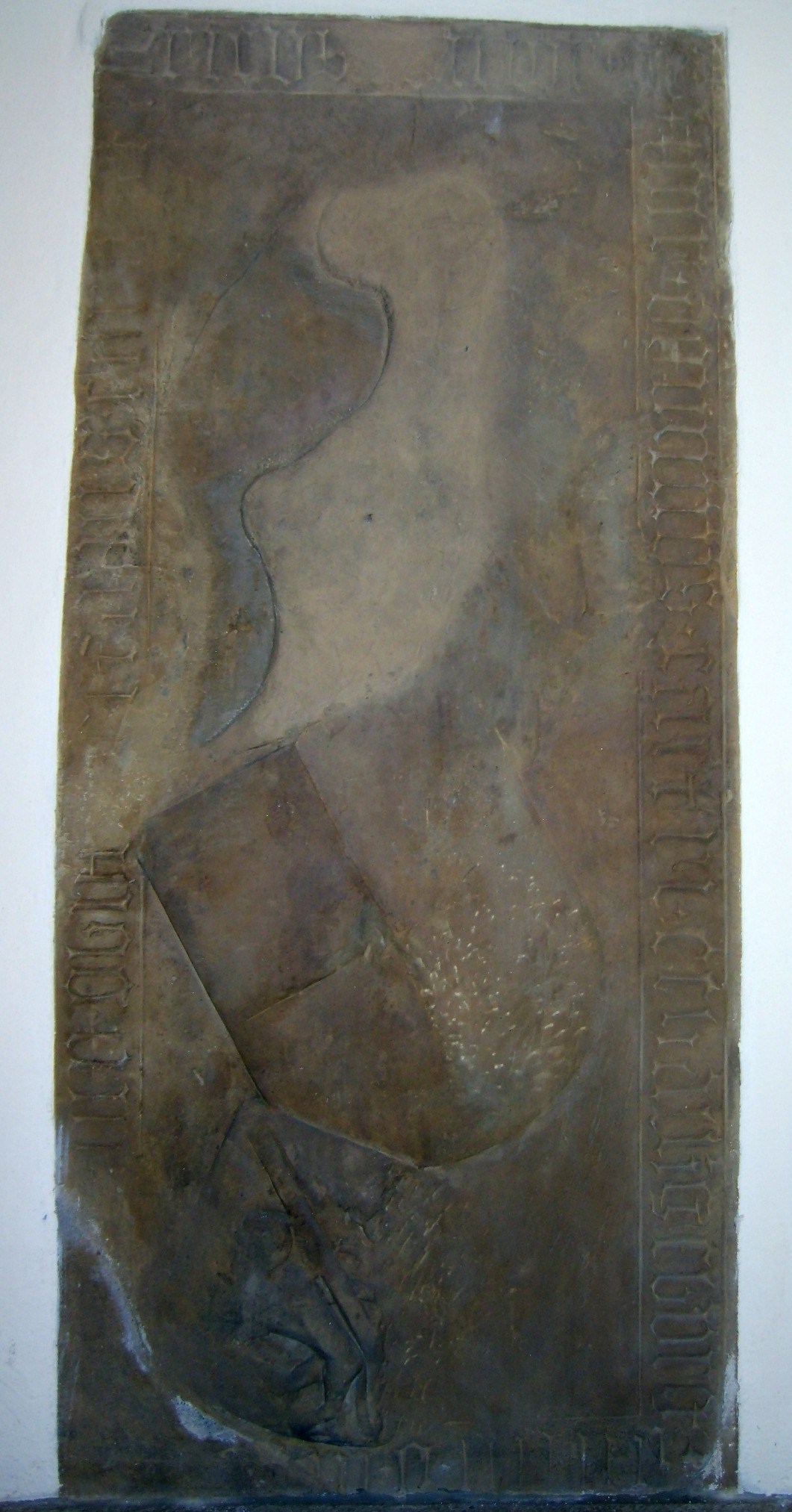 Grabstein Friedrich VI. († 1403) in der Stadtkirche Balingen